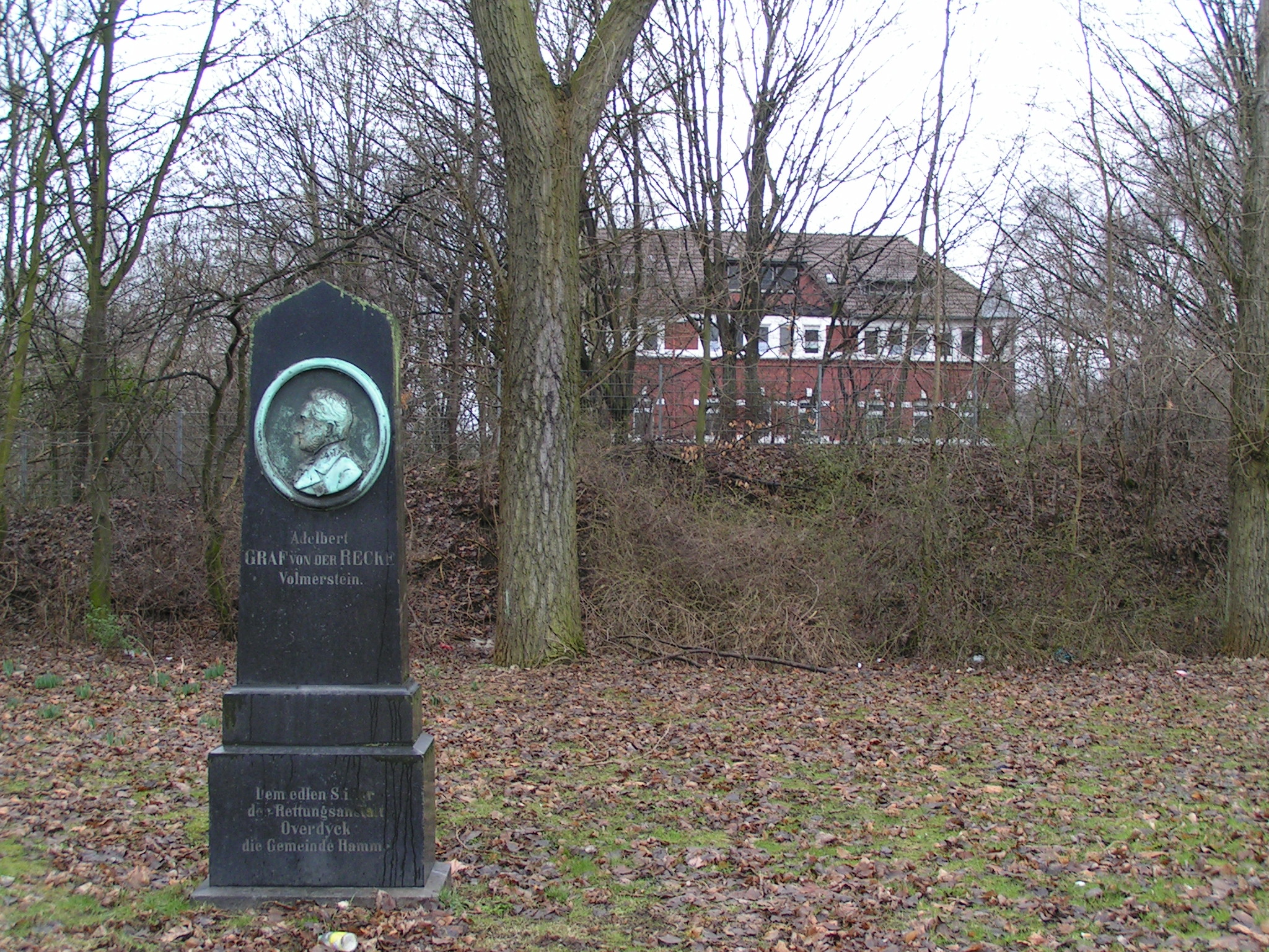 Denkmal für Adelbert Graf von der Recke-Volmerstein an der Dorstener Str. Die Inschrift ist "Dem edelen Stifter / der Rettungsanstalt / Overdyck / die Gemeinde Hamme". In Hintergrund das heutige Gebäude des von ihm geschifteten Kinder- und Jugendheim Haus Overdyck. Monument for Adelbert Graf von der Recke-Volmerstein on the Dorstener Str., founder of the children´s home Overdyck (in the back) Date: March 2005, Bochum, Germany Author: Maschinenjunge Licence: see below.